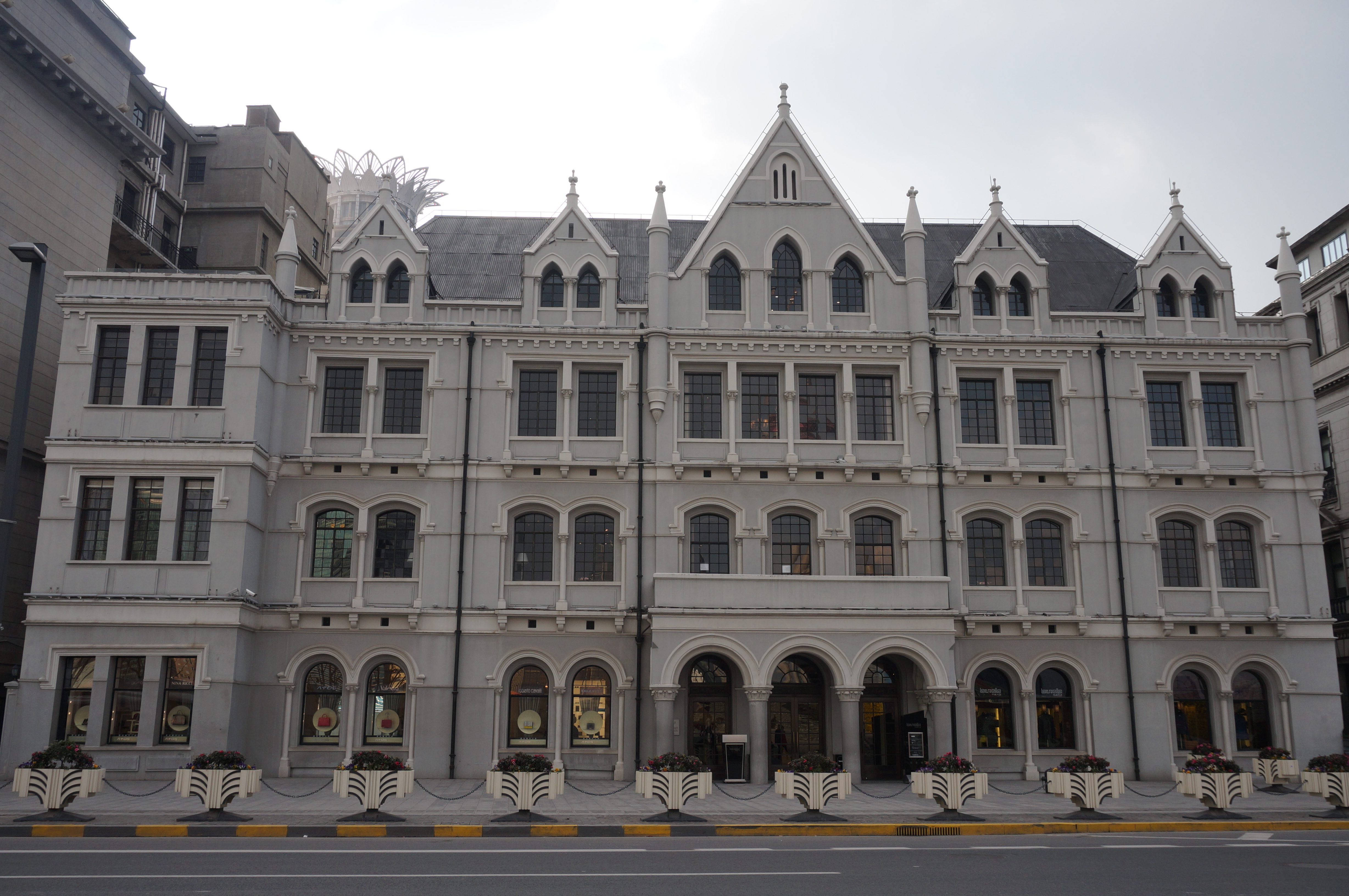 外滩中国通商银行大楼